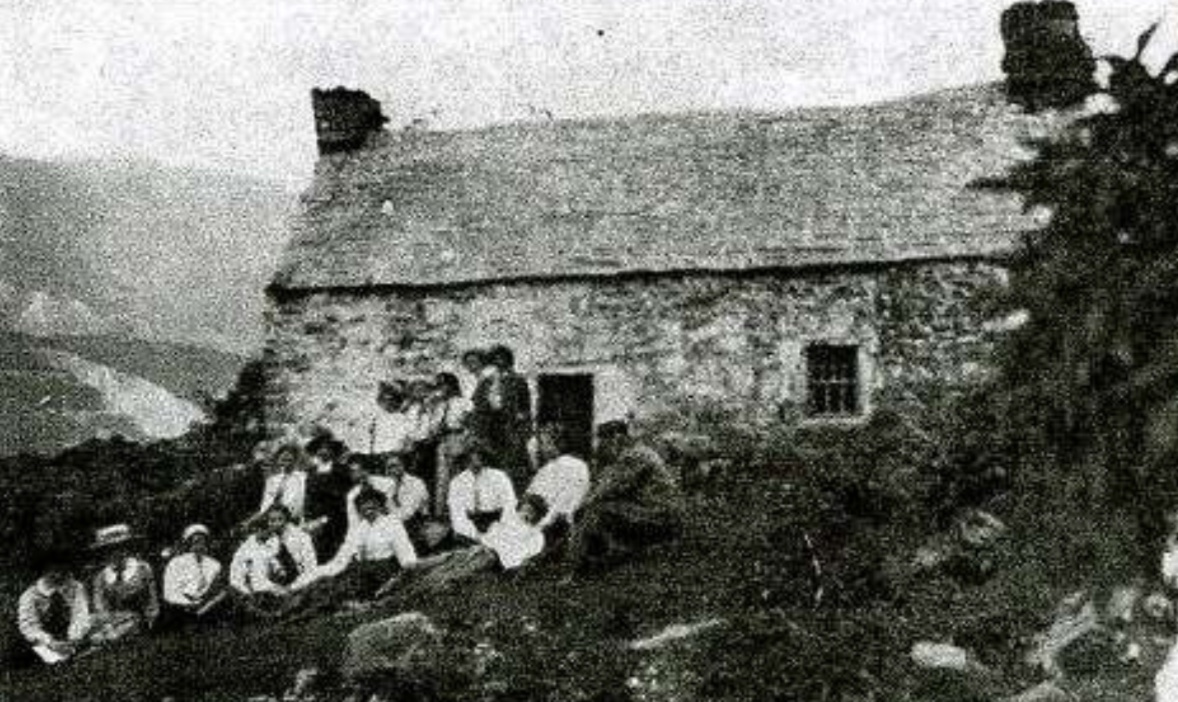 Llun a dynnwyd yn 1912 o grwp o fyfyrwyr o Crewe ar ymweliad maes yn aros yn Ty Dŷ, Lôn Clegyr, Llanberis